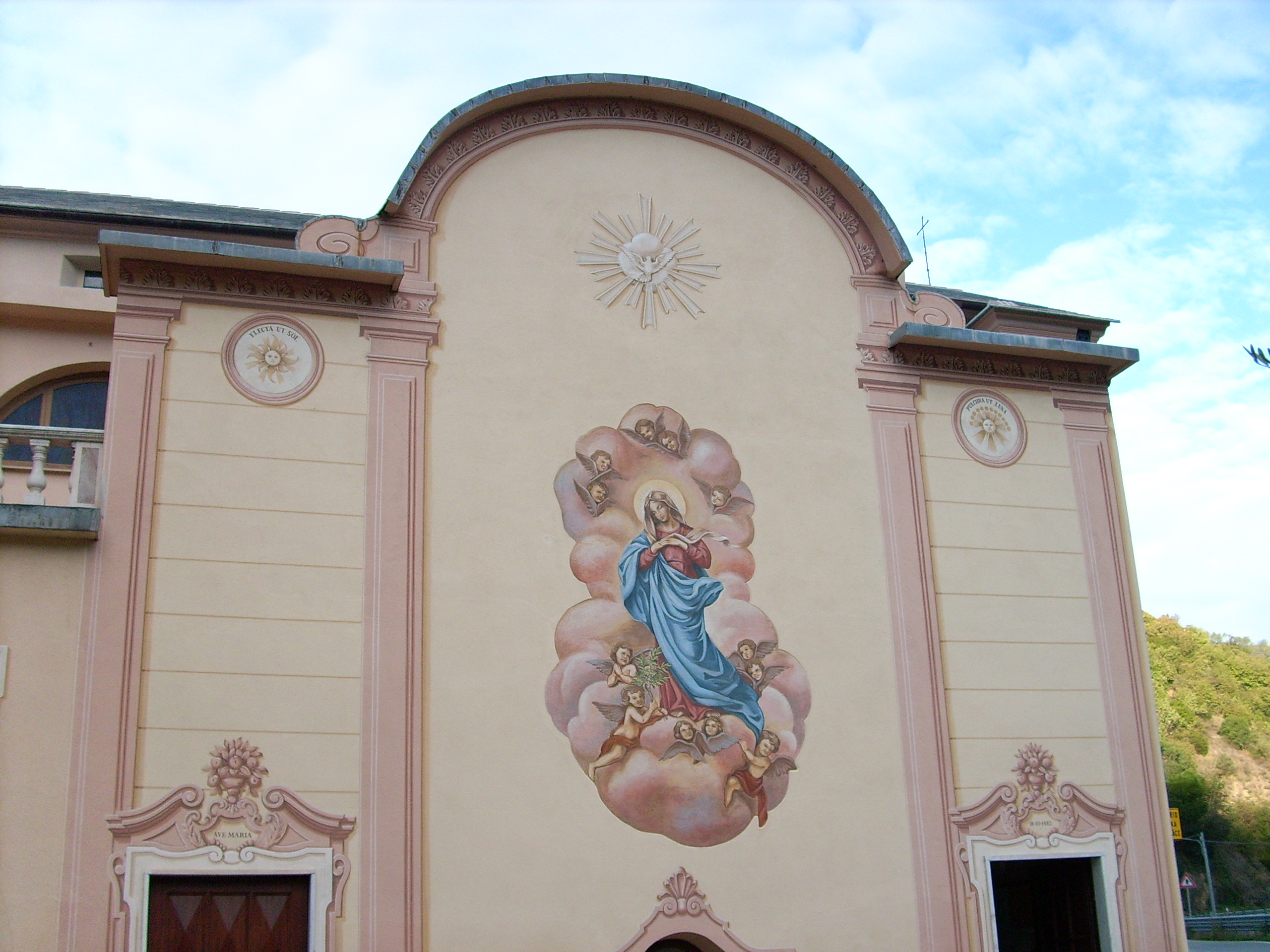 Santuario di Nostra Signora della Pace presso Albisola Superiore, Liguria, Italia